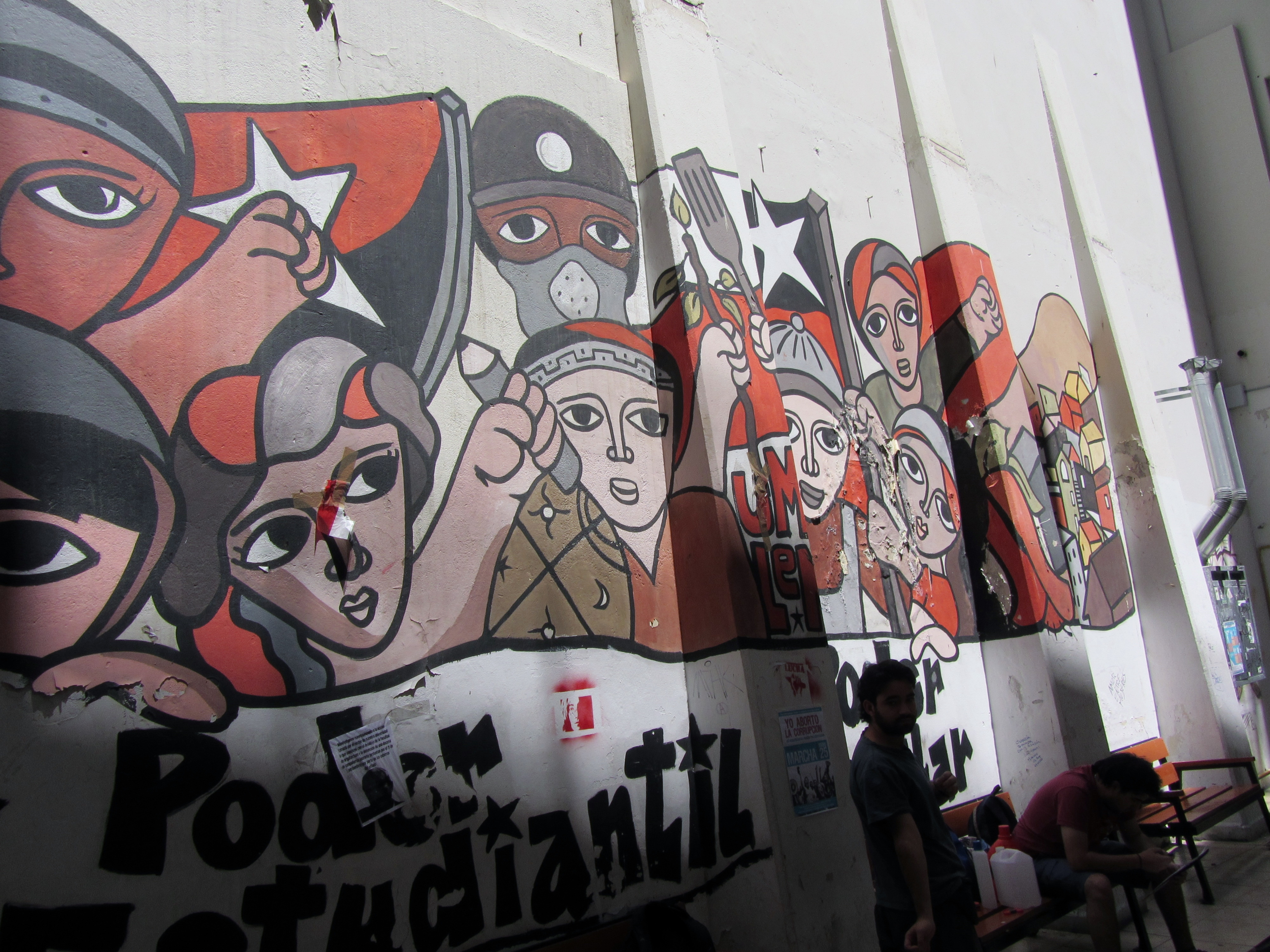 Grafiti pintado por las Unidades Muralistas Luchador Ernesto Miranda (UMLEM) de la V Región el sábado 4 de junio de 2011 en apoyo a la lucha de los estudiantes durante la toma de la Facultad de Humanidades de la Universidad de Valparaíso (calle Serrano 546). El mural tiene 4 metros de alto por 7 de largo aproximadamente; lemas pintados: Poder estudiantil Poder Popular Toma 2011 Humanidades.